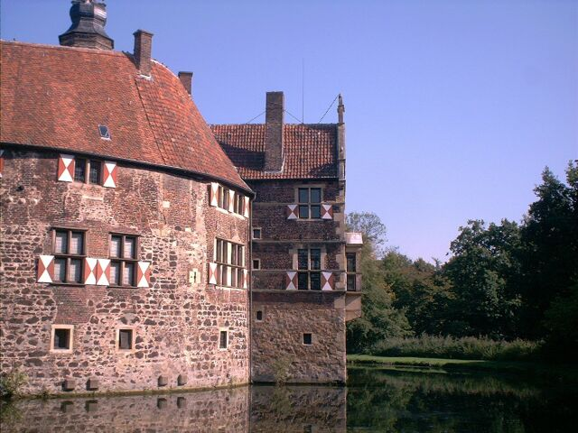 Teil der Burg Vischering